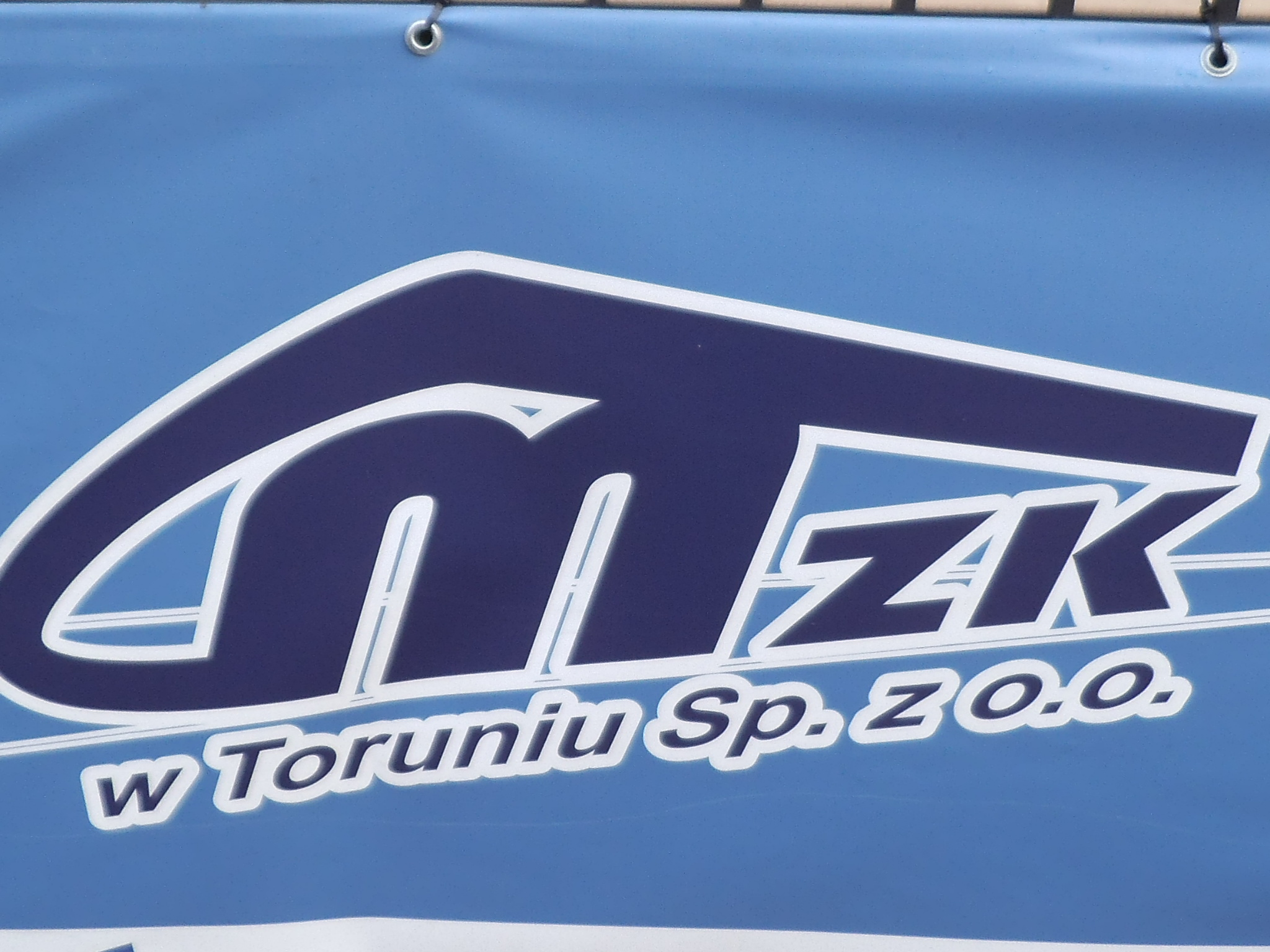 Logo MZK w Toruniu